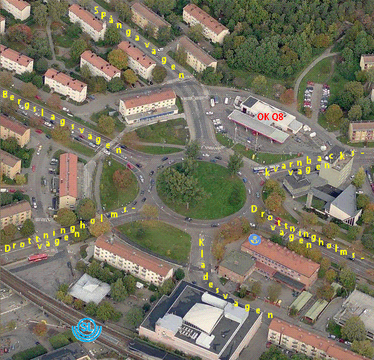 Karta över brommaplansrondellen